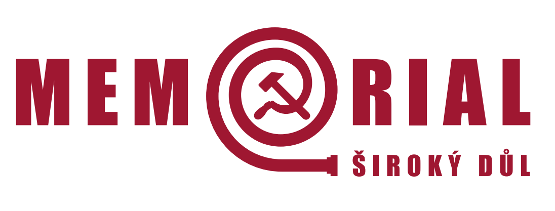 Logo Soutěže o putovní pohár VŘSR - Memoriálu V. I. Lenina